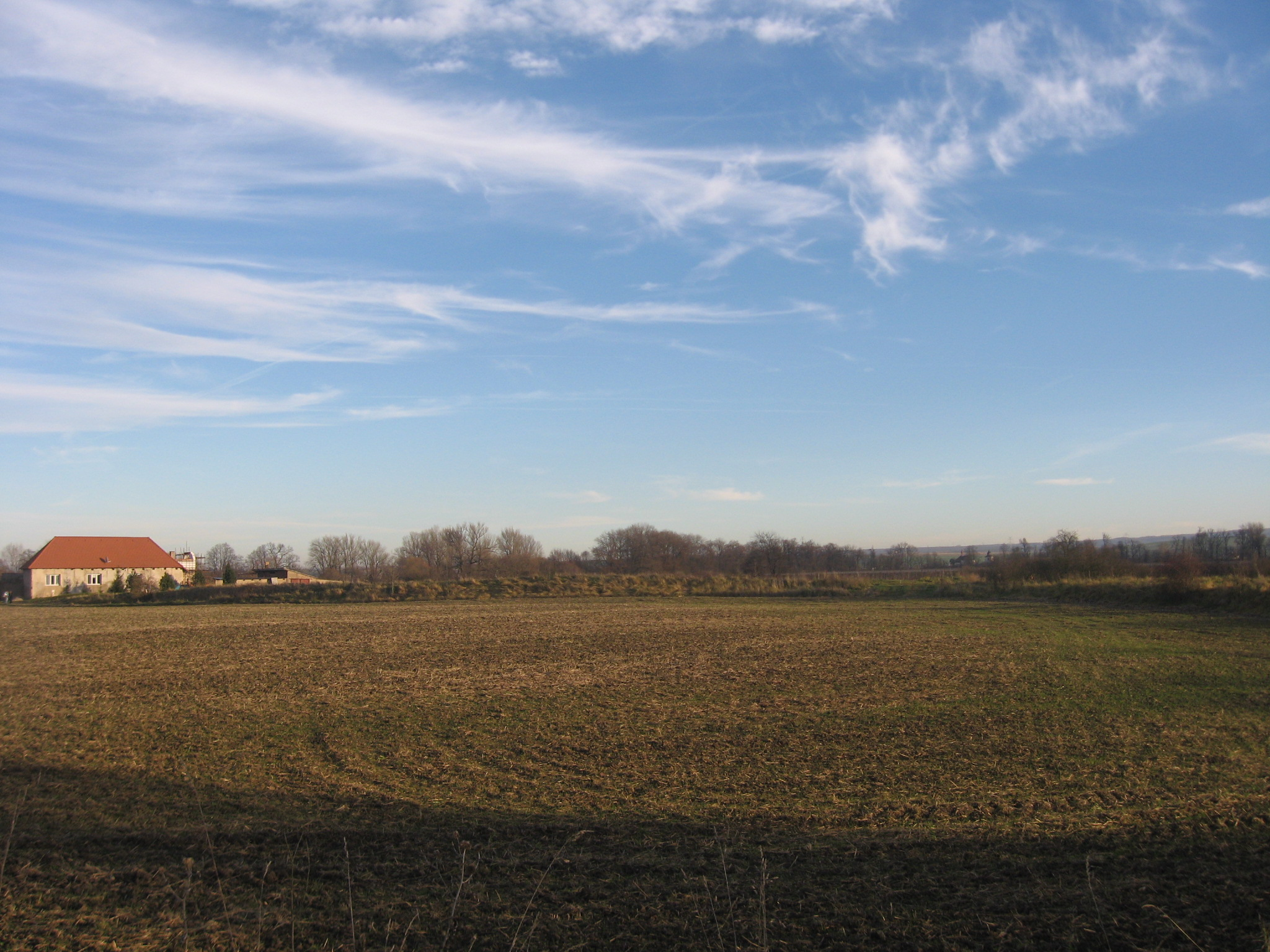 Valy hradiště Dragúš